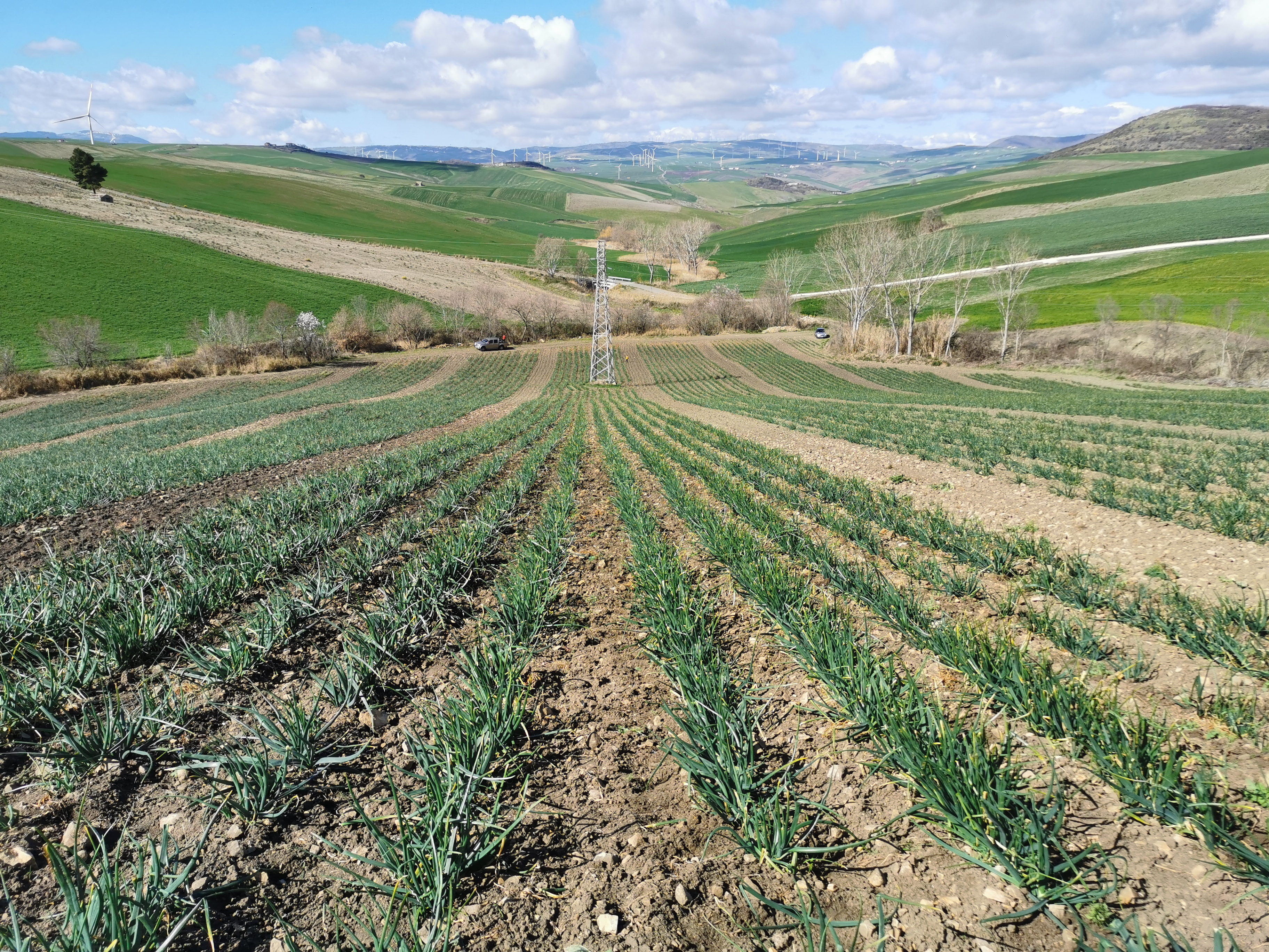 campo di cipolle (puglia)